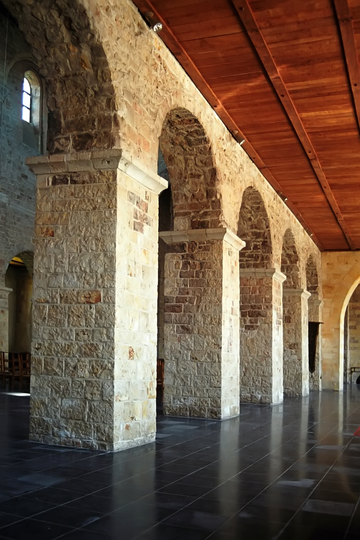 Belgique - Brabant wallon - Église Sainte-Adèle-et-Saint-Martin d'Orp-le-Grand